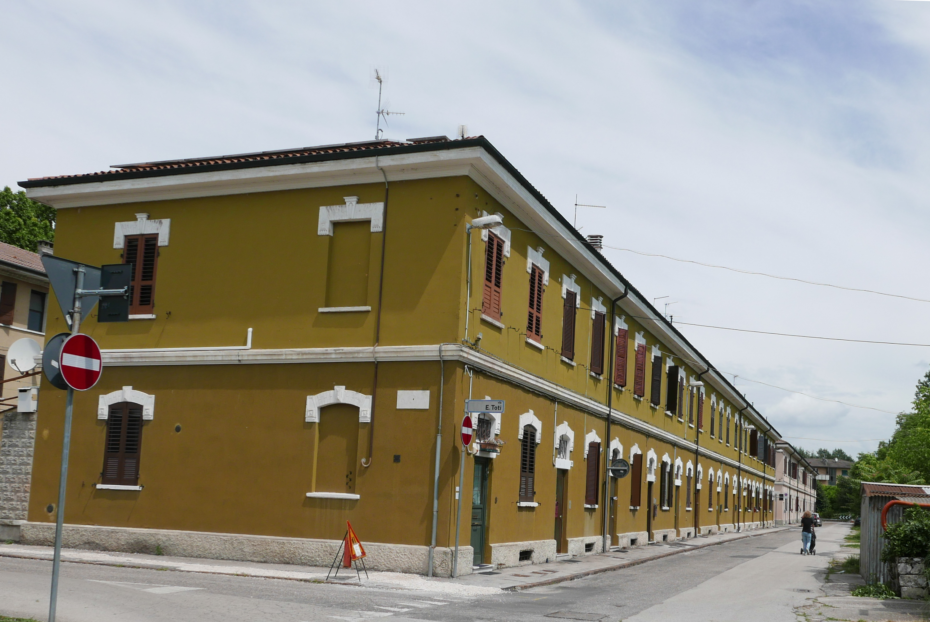 Case popolari in Zona Ferrovieri, a Vicenza